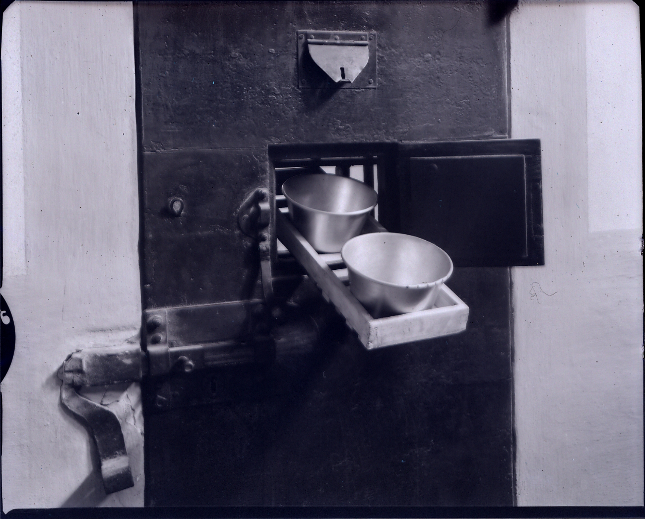 Servizio fotografico : Milano, 1959 / Paolo Monti. - Buste: 4, Fototipi: 4 : Negativo b/n, gelatina bromuro d'argento/ pellicola ; 10x12. - ((Serie costituita da 4 buste sciolte di negativi identificati con i nn.: 1515, 1516, 1517, 1518. - Occasione: Documentazione della lavorazione del film "Il generale Della Rovere", diretto da Roberto Rossellini nel 1959. - , presso Archivio Paolo Monti. - Fonte: Rubrica di Paolo Monti: Archivio 10x12 (ultimi numerati) - dal G1 al (s.d.)